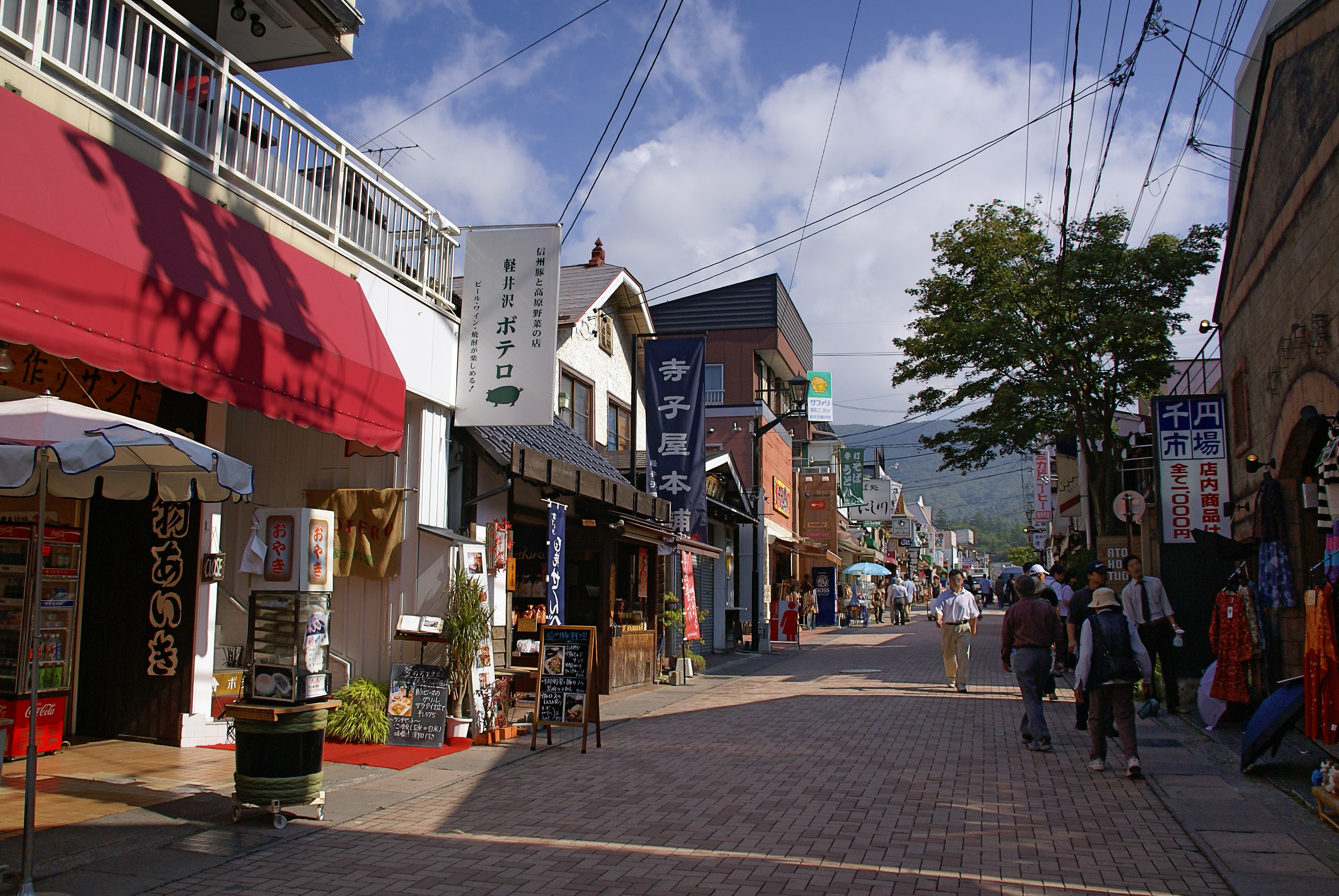 Old Karuizawa Ginza in Karuizawa, Nagano, Japan